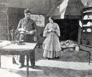 Jack J. Clark and Gene Gauntier